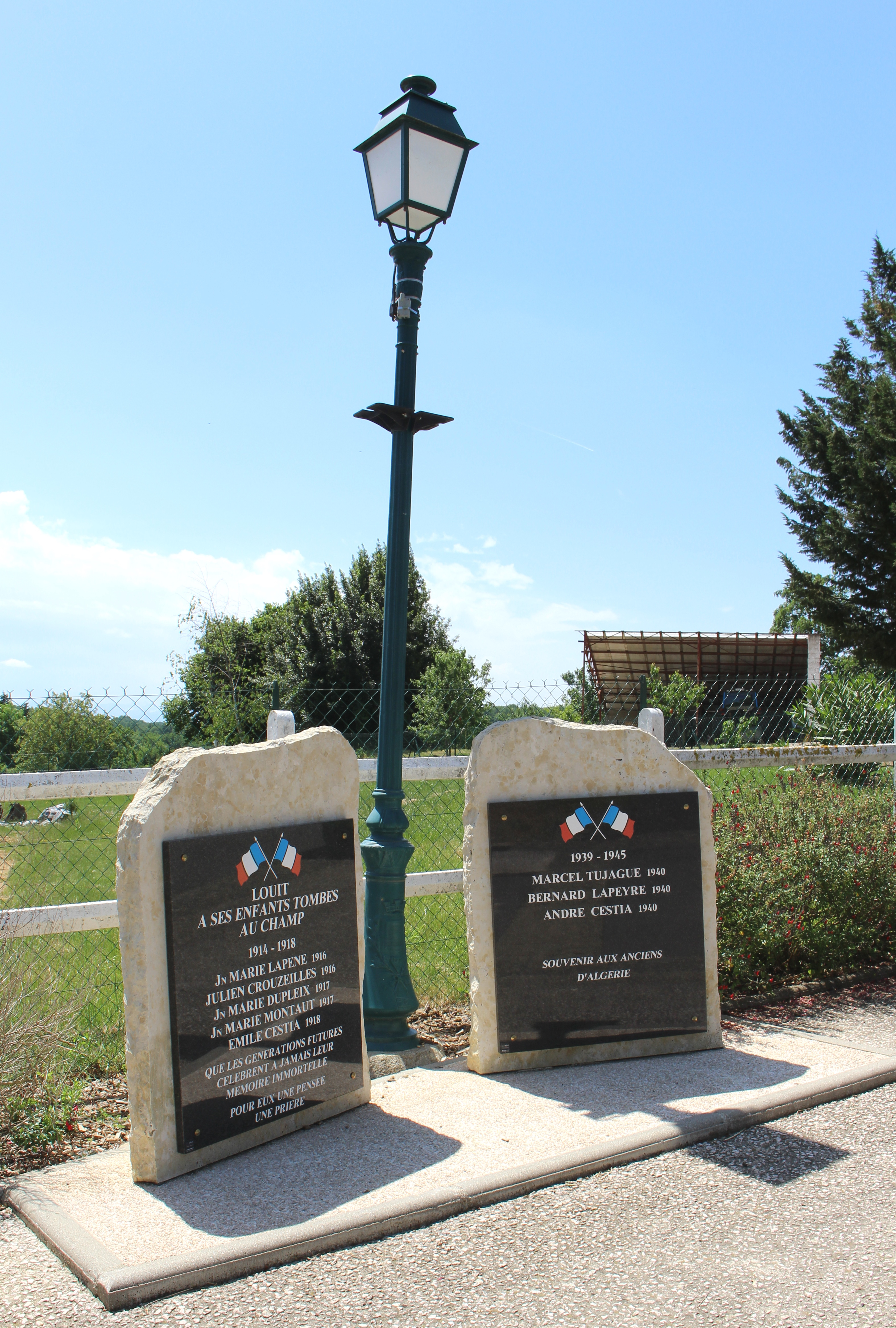 Monument aux morts de Louit (Hautes-Pyrénées)